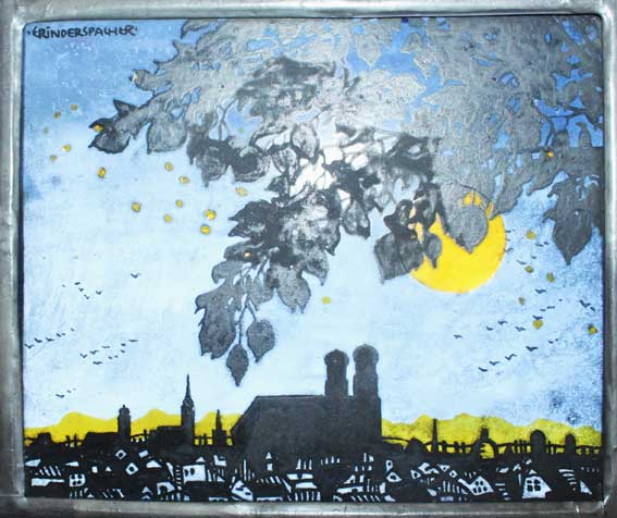 Ernst Rinderspacher Silhouette von München mit den Türmen der Frauenkirche. Hinterglasmalerei.